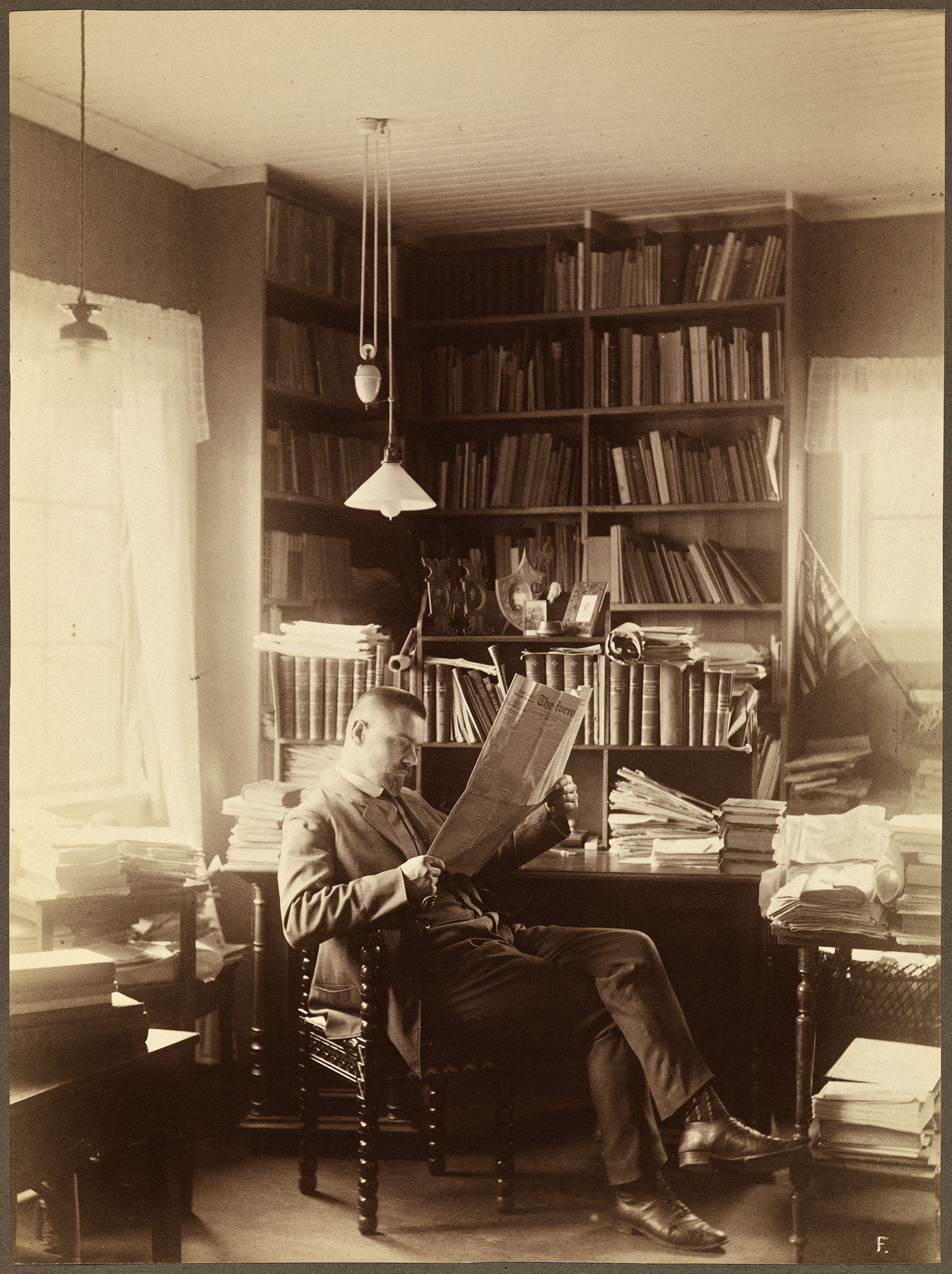 Tittel / Title: Portrett av Halvdan Koht på arbeidsrommet på "Karistua", Lysaker Beskrivelse / Description: Koht var historiker og politiker (utenriksminister fra 1935-1941). Dato / Date: ukjent / unknown Fotograf / Photographer: ukjent / unknown (fotografiet er signert "F") Sted / Place: Akershus, Bærum, Lysaker Eier / Owner Institution: Nasjonalbiblioteket / National Library of Norway Lenke / Link: Bildesignatur / Image Number: bldsa_SKARD0037